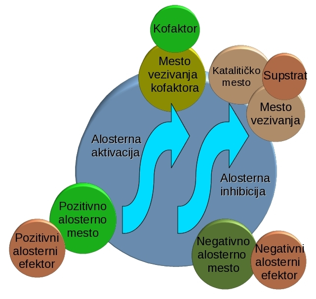 Enzyme Model